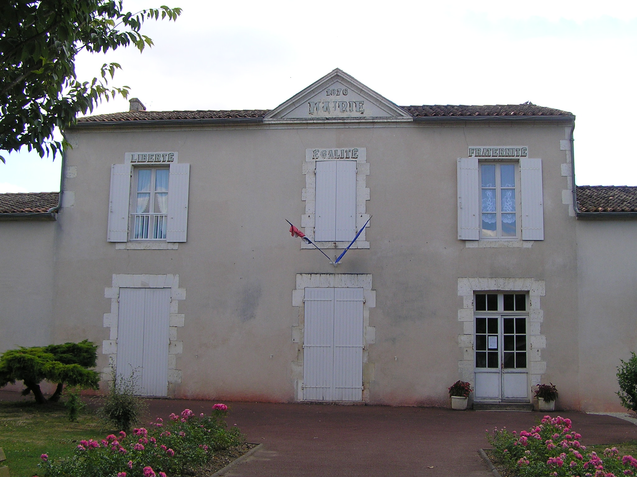 mairie de Genac